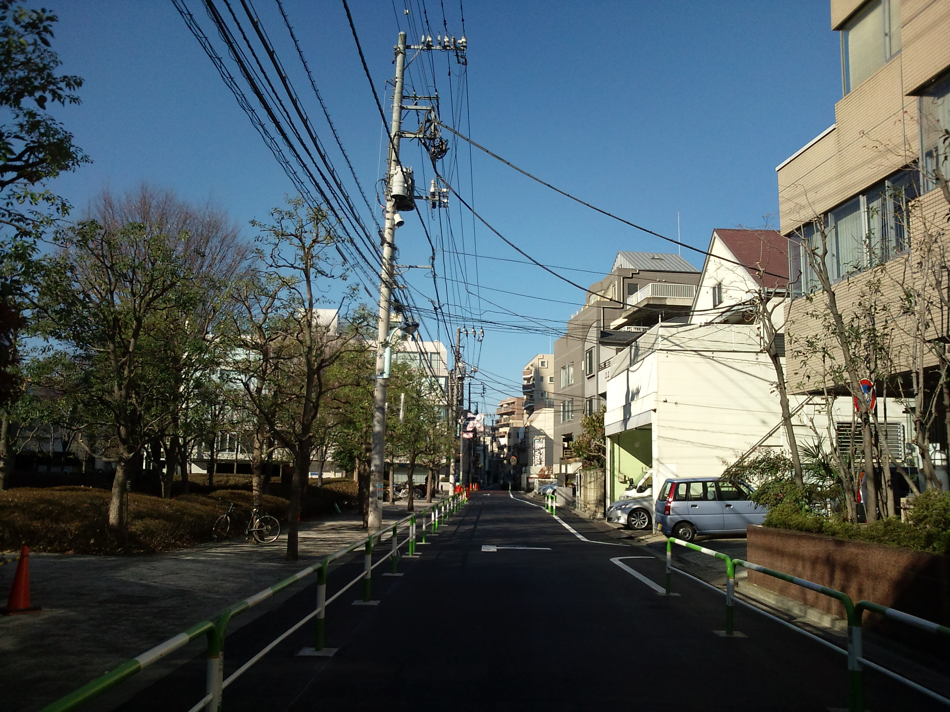 文京区水道１丁目の町並み